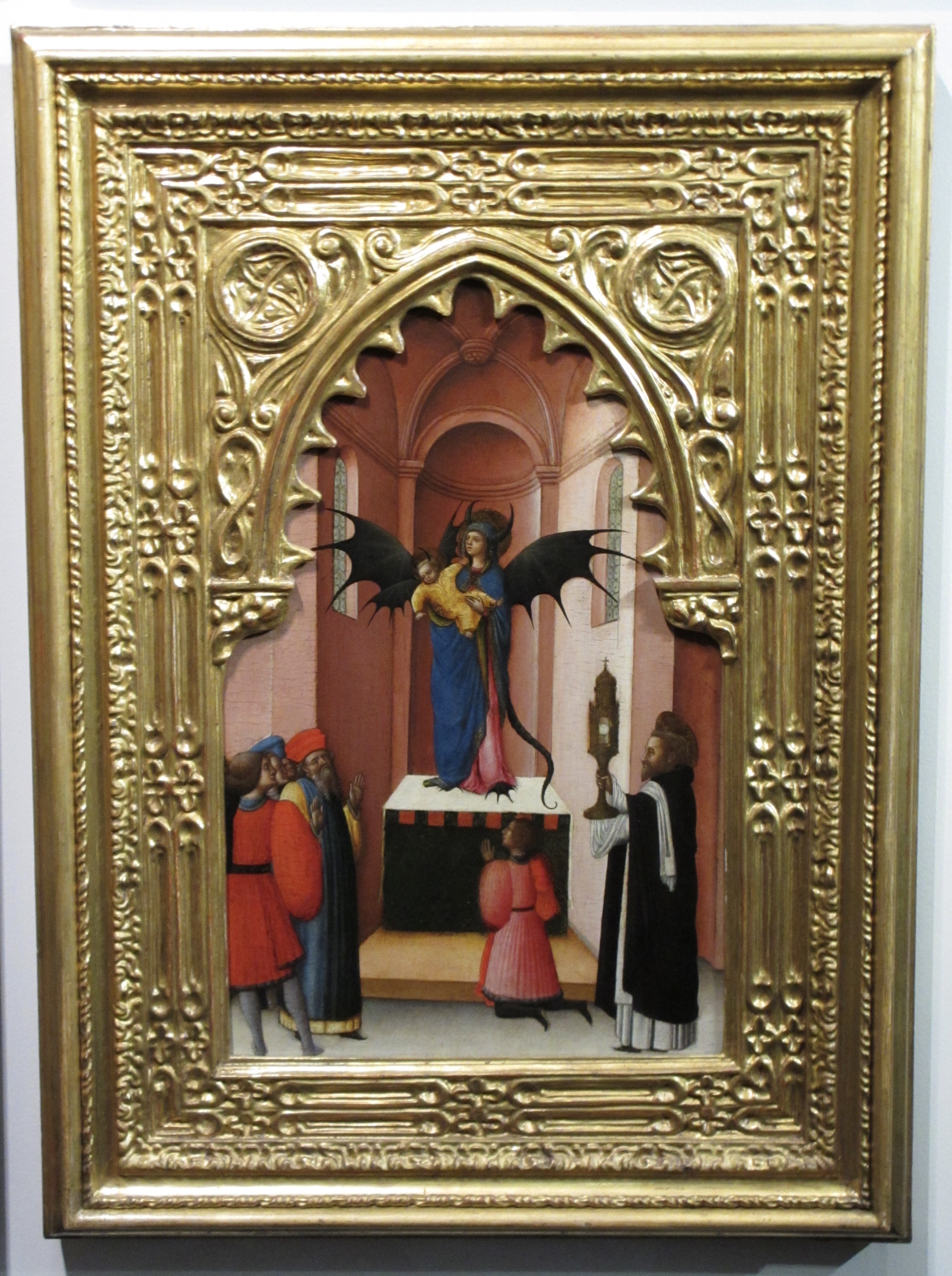 Antonio Vivarini Saint Pierre exorcisant un démon ayant pris les traits d'une Vierge à l'Enfant